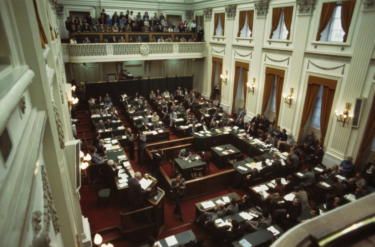 Tweede Kamer, Algemene Beschouwingen; totaaloverzicht Tweede Kamer